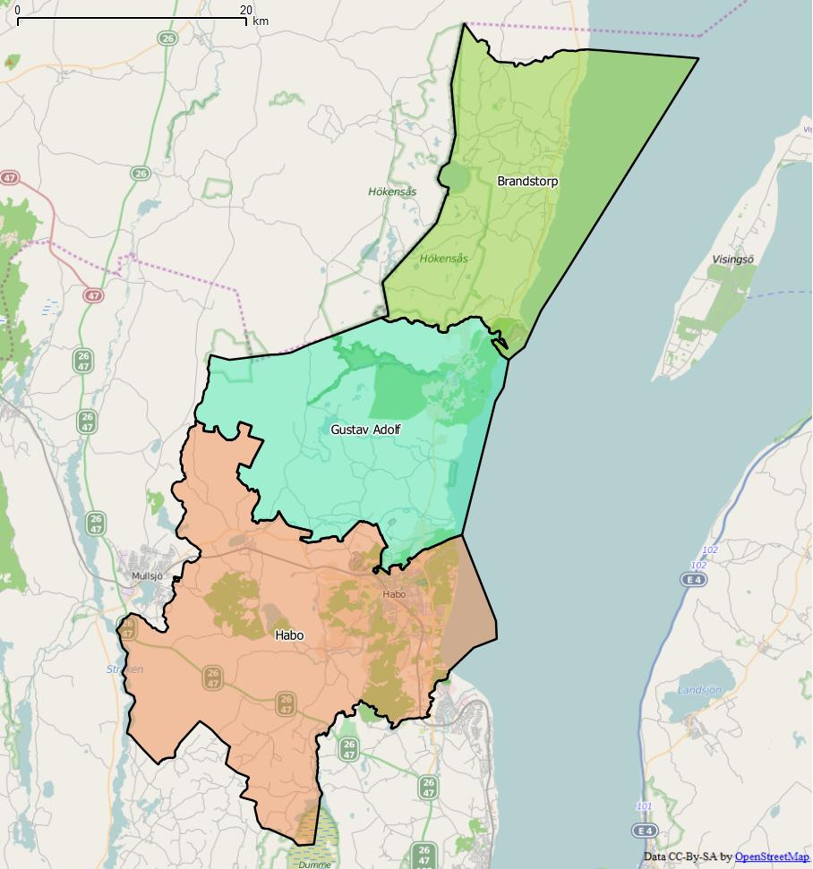 Distriktsindelningen i Habo kommun